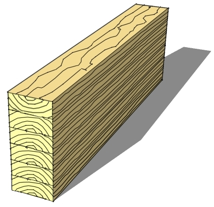 Brettschichtholz. In der Zeichnung zeigen die inneren Jahresringe (d.h. die sog. "rechte" Seite) der obersten und untersten Lamelle jeweils nach außen.